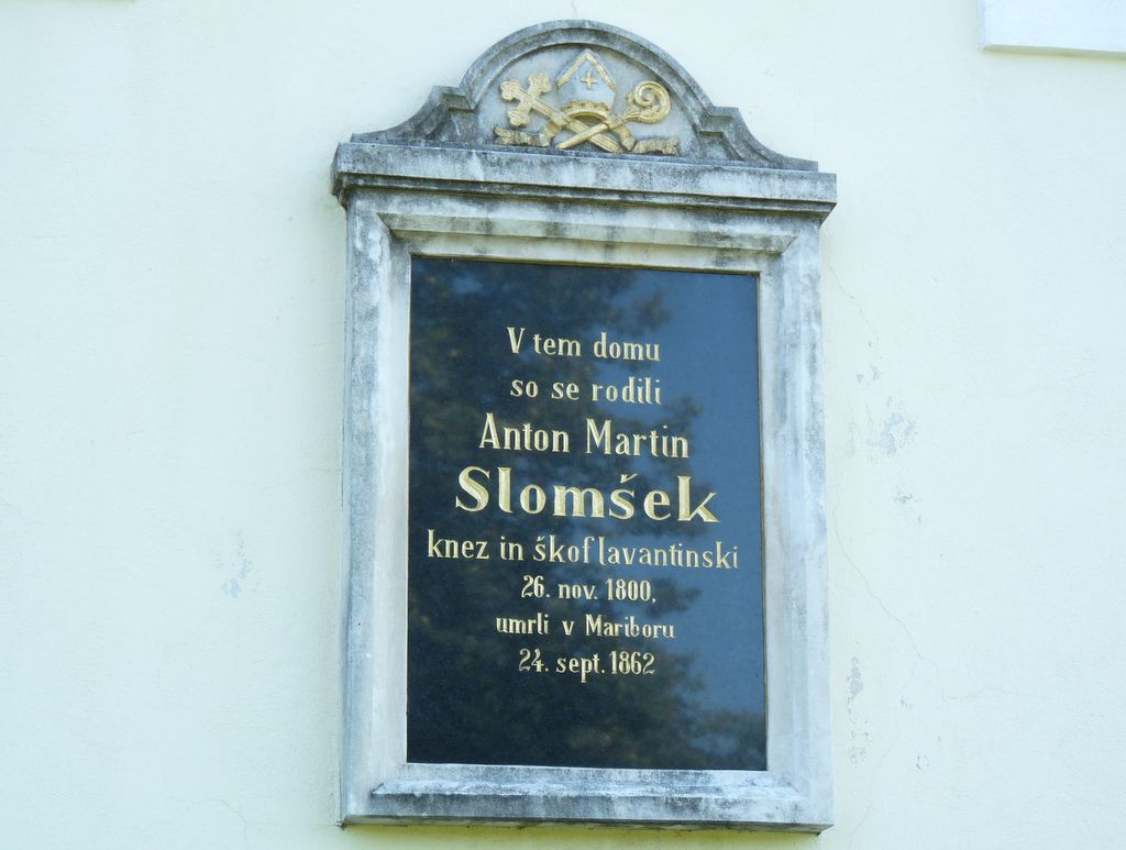 Obeležje na rojstni hiši Antona Martina Slomška, Slom ob Ponikvi